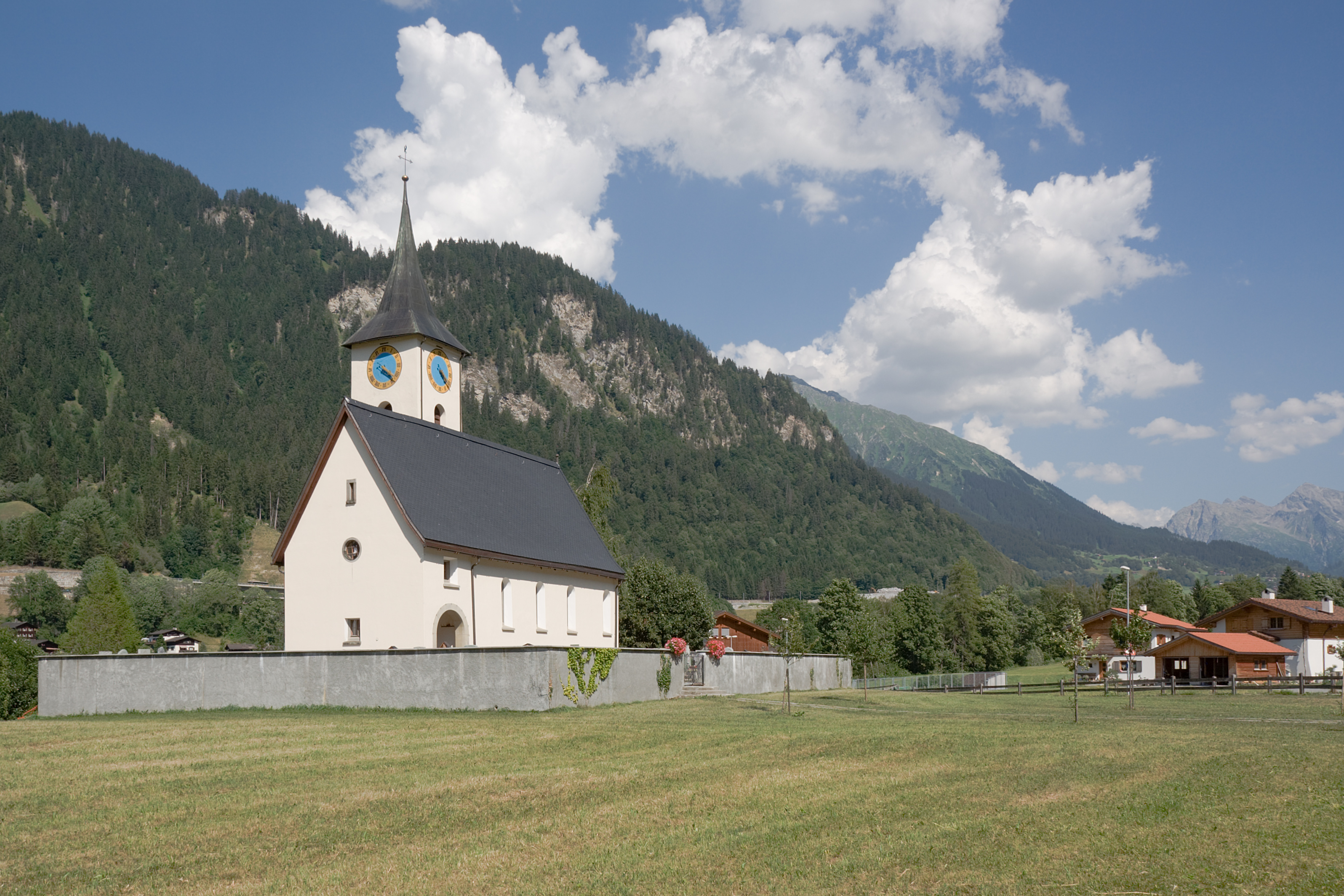 Die Kirche von Serneus, Schweiz